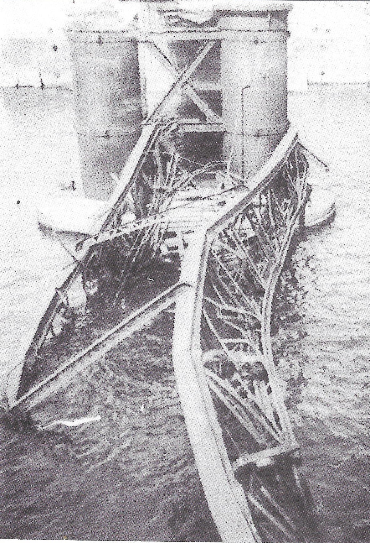 גשר מעל פתח הכניסה לנמל ואלטה שקרס מתקיפת סירת נפץ איטלקית